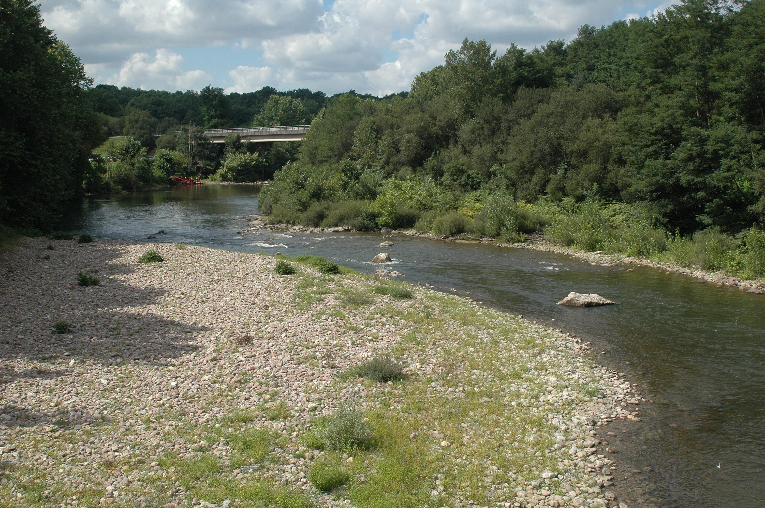 Itxassou, vue sur la Nive. Photo prise le 03/08/06 par Harrieta171